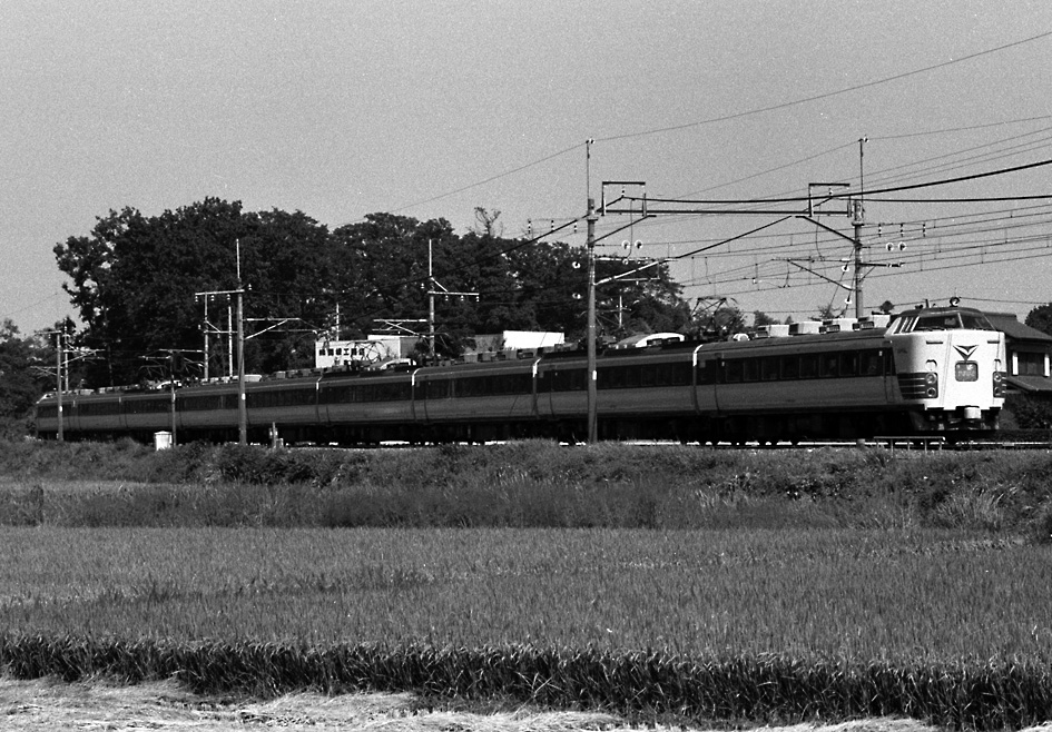 国鉄485系 特急やまばと